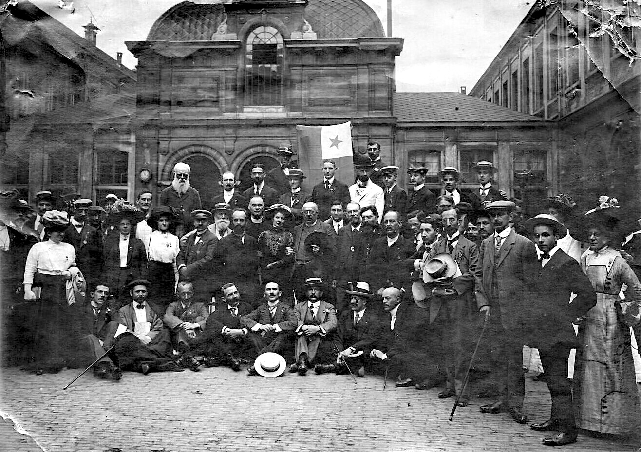 sepa Universala Kongreso de Esperanto en Antverpeno/En la Reĝa Ateneo)